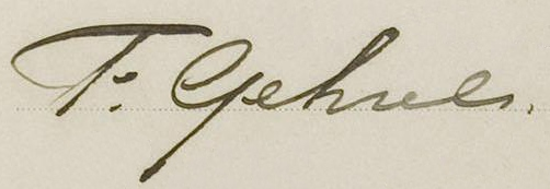 Подпись Фрека Герелса